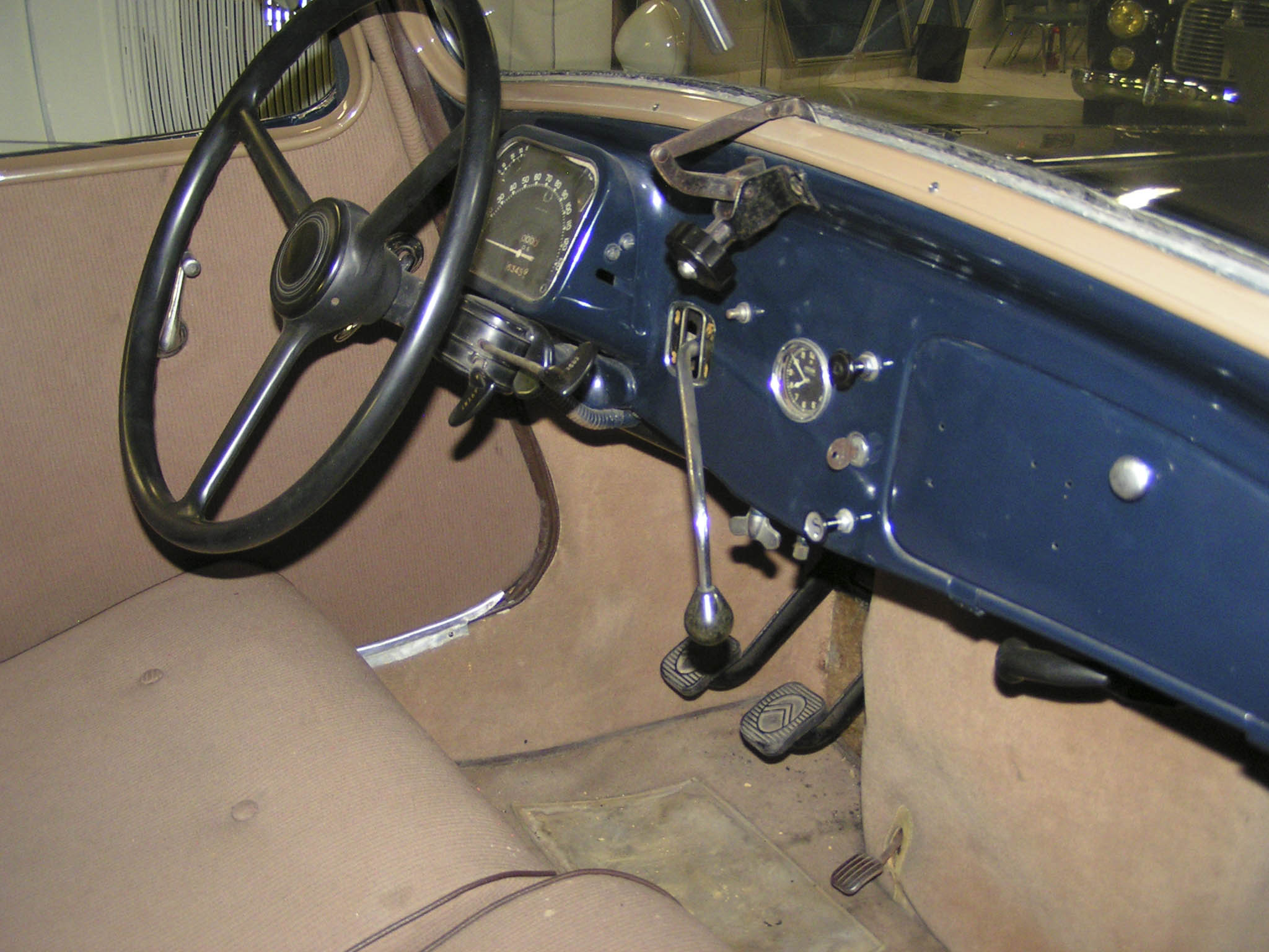 Citroen 7CV